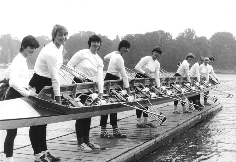 Nationalmannschaft, DDR, Achter ADN-ZB Mittelstädt 19.8.82 Berlin: Der DDR-Achter der Frauen macht sich startklar zu einer Trainingsfahrt in Vorbereitung auf die Ruder-Weltmeisterschaft in Luzern. vlnr: Steuerfrau Kirsten Wenzel, Claudia Noack, Ute Steindorf, Sabine Portius, Carola Miexler, Steffi Götzelt, Sigrid Anders, Iris Rudolph und Schlagfrau Karin Metze. Achtung! Bitte offizielle Nominierung am 20.8.82 beachten!